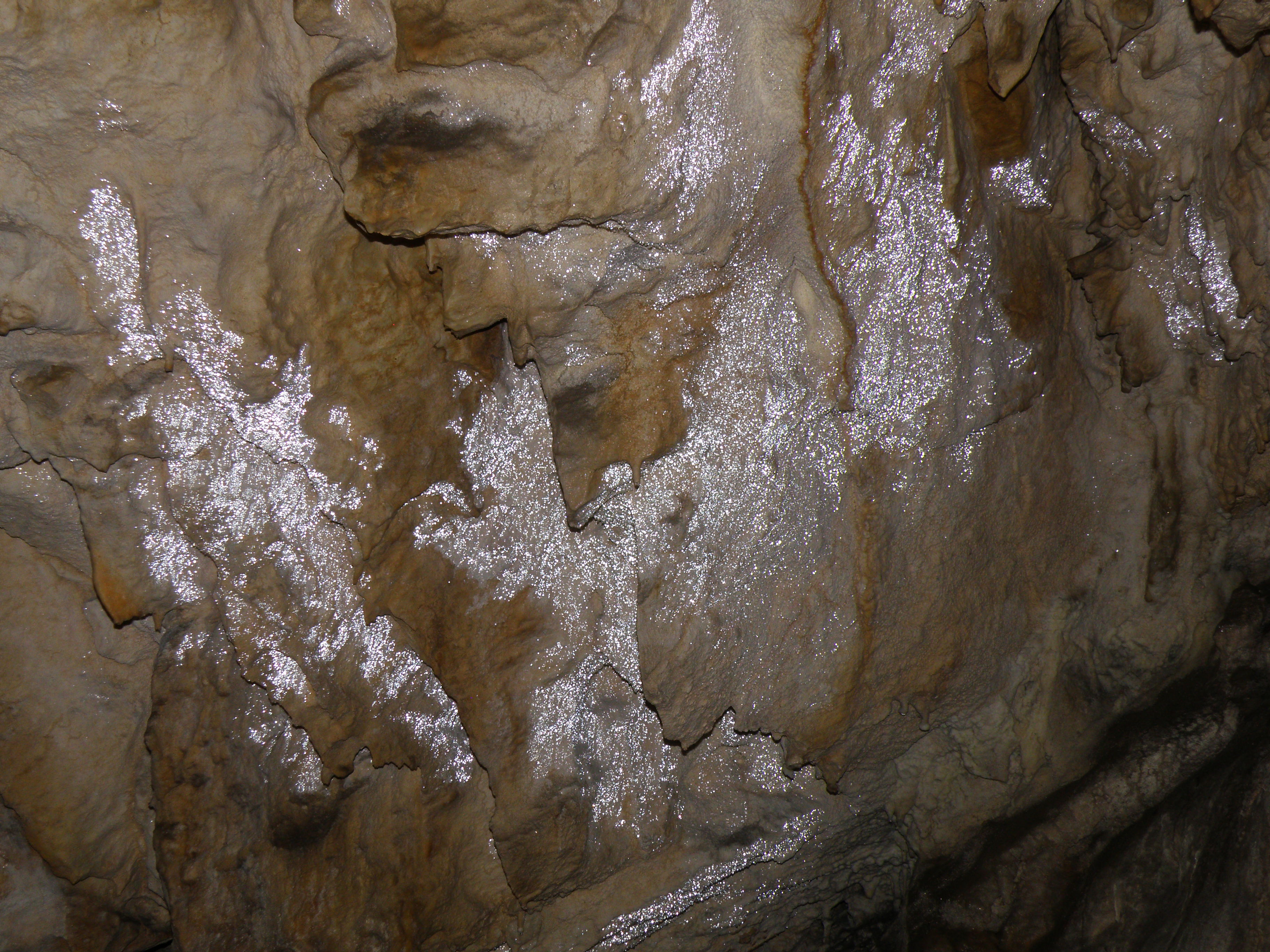 Алилица, Тресонче